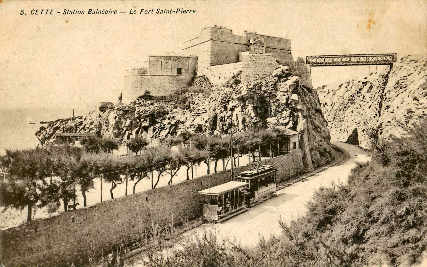 Carte postale ancienne sans mention d'éditeur, n°5 : CETTE - Station balnéaire - Le Fort Saint-Pierre